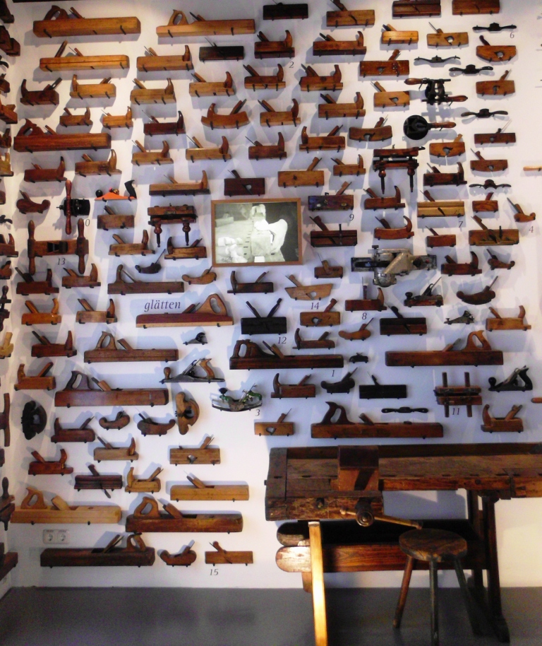 Verschiedene Hobel der Bootsbauer